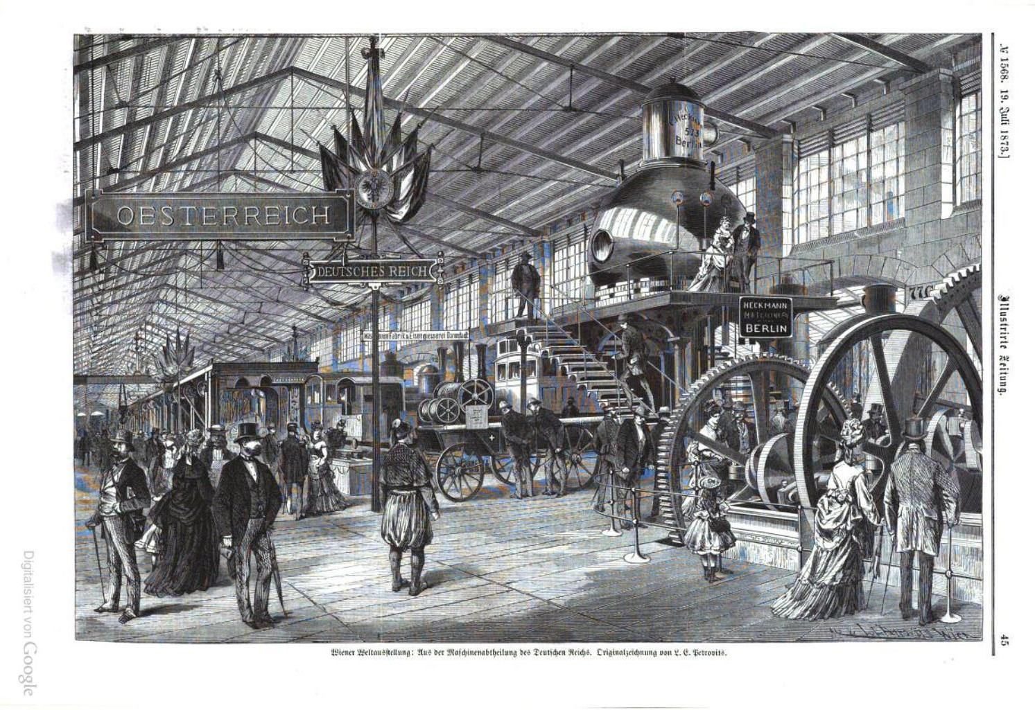 expo 1873 Ausstellung Deutsches Reich